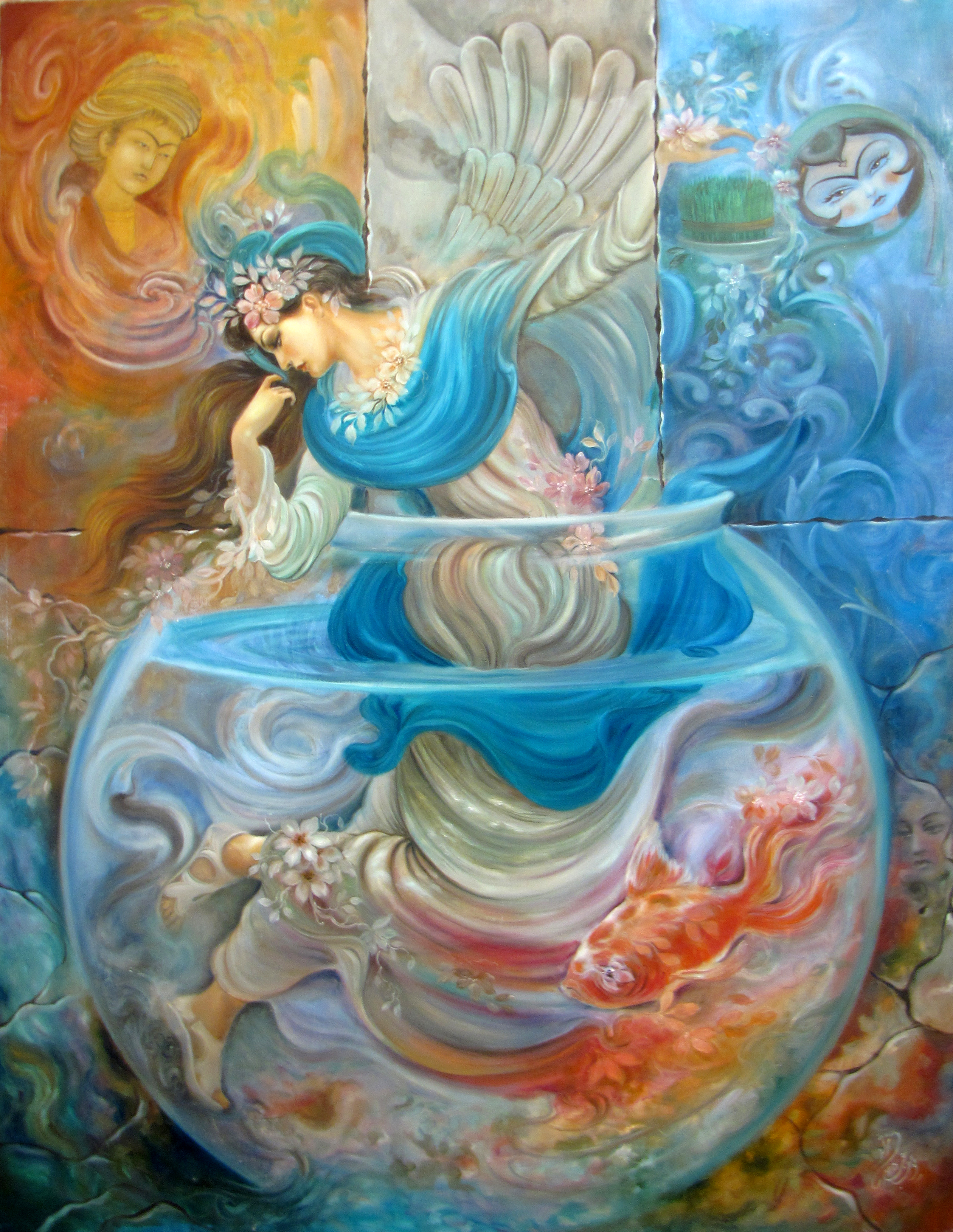 نوروز اثر یوسف عبدی نژاد رنگ روغن روی بوم ۱۳۷۵ Nowrooz oil on canvas 1996 Painter: Yousef Abdinejad